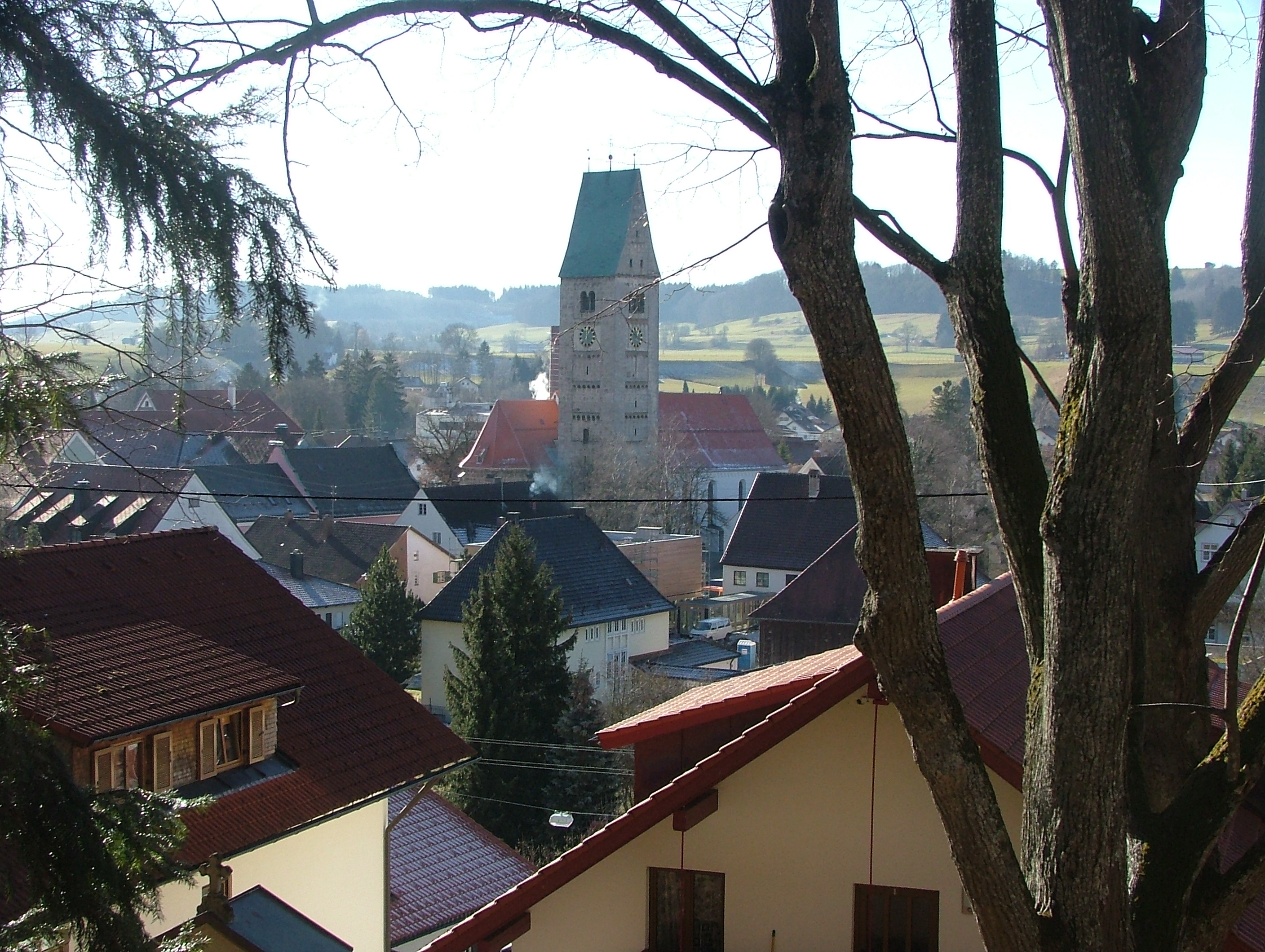 Obergünzburg, Blick zur Pfarrkirche St. Martin